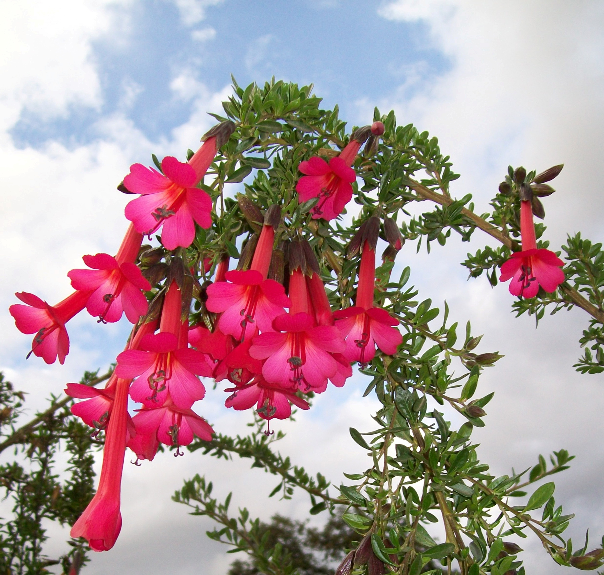 La Flor Sagrada de los Inkas Nombre:Flor Nacional del Perú País:Perú Fotógrafo:© Edgar Amador Espinoza Montesinos